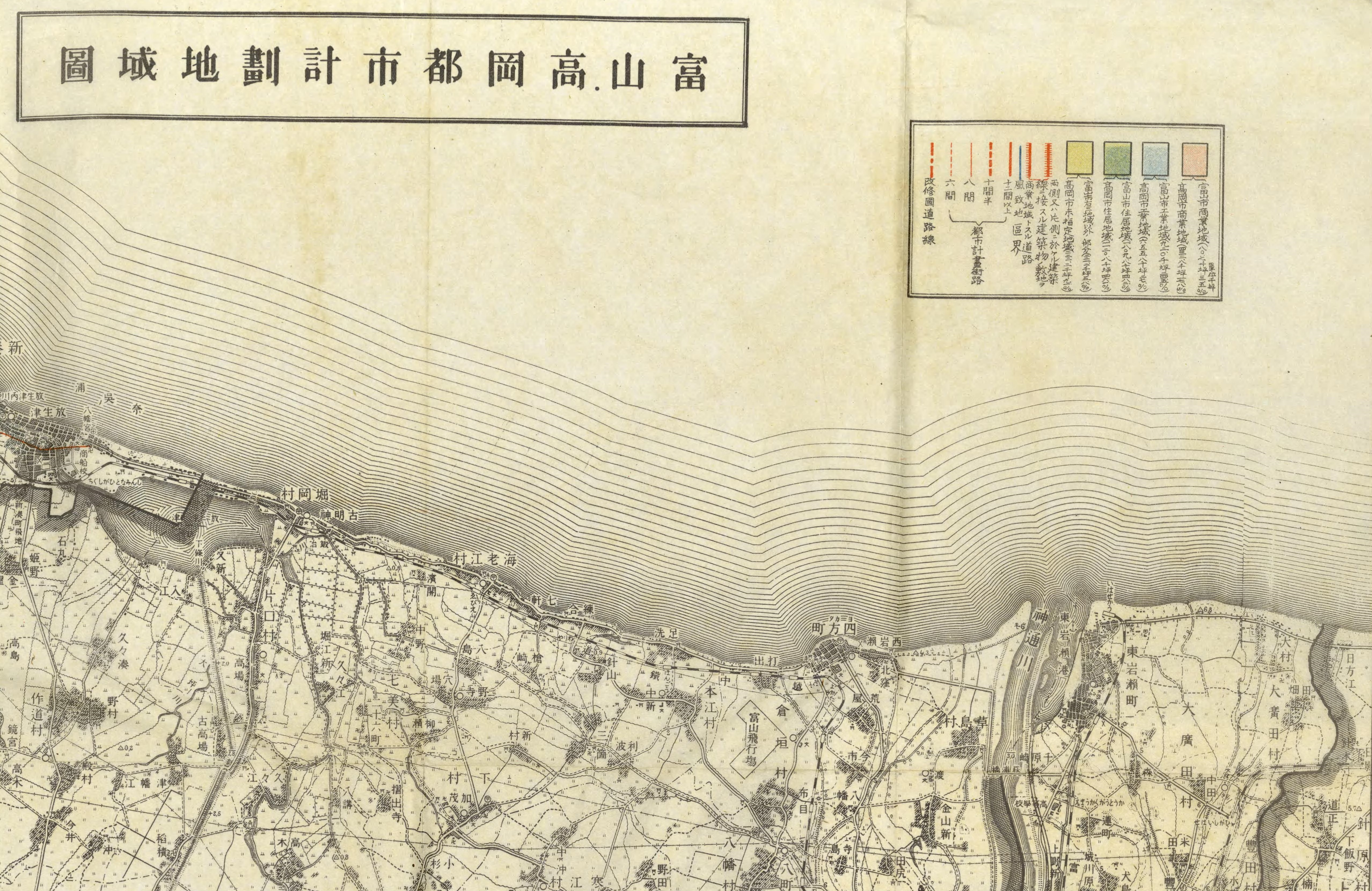 越中鉄道時代の射水線の沿線概況を示す地図。倉垣の富山飛行場も記載されている。